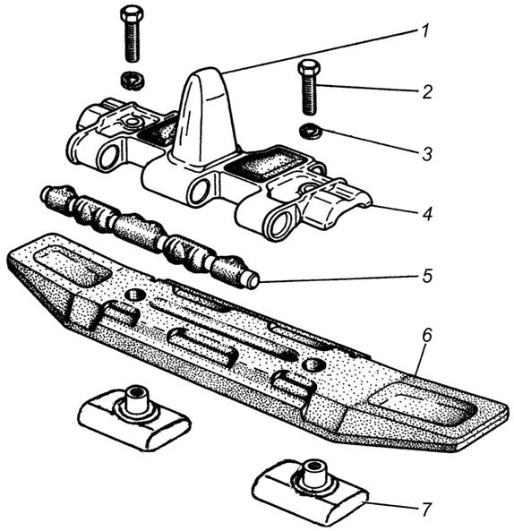 Звено асфальтоходной гусеницы гусеницы, применяется на снегоботоходах ГАЗ-3409 "Бобр"